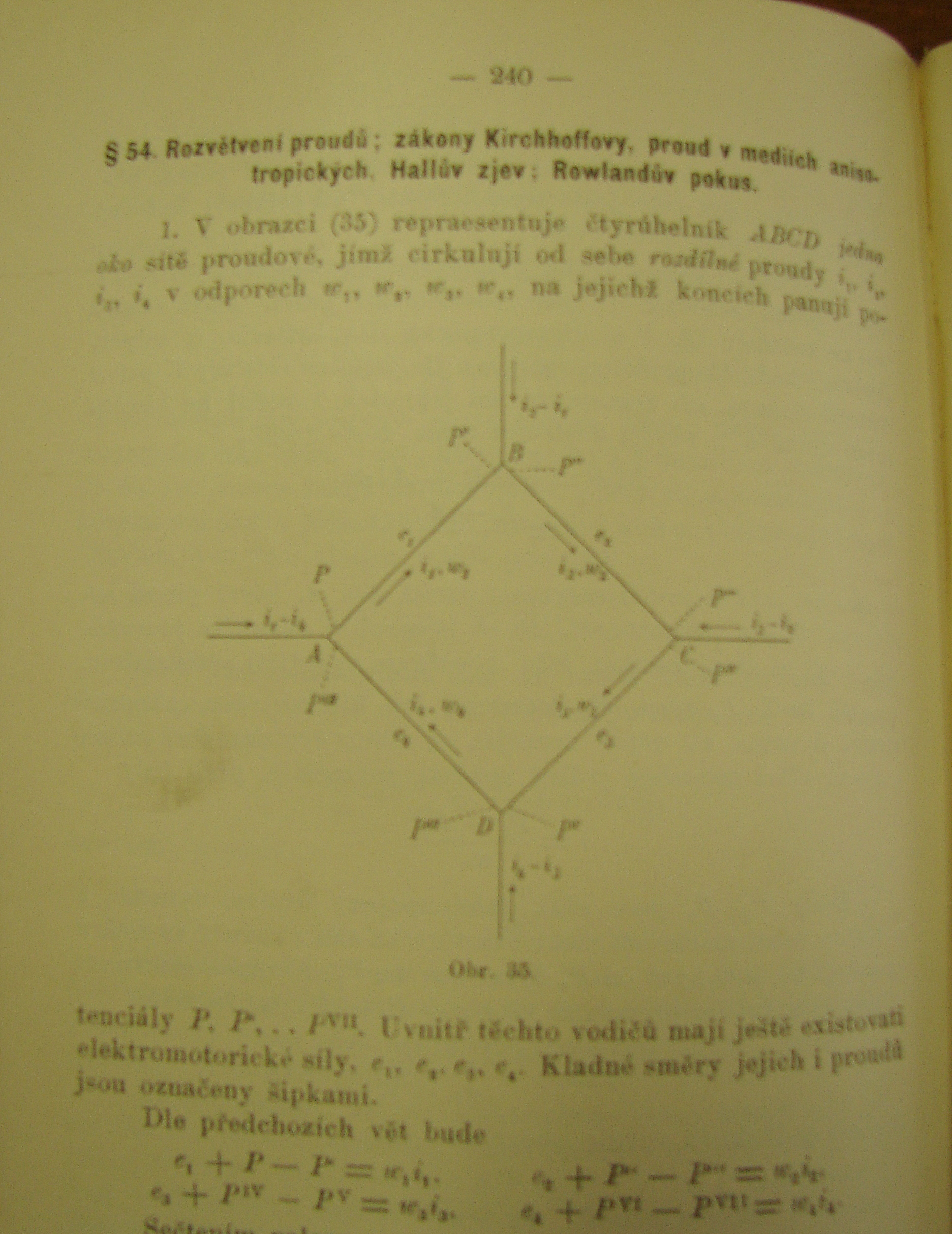 Foto z Koláčkova díla o elektřině a magnetismu